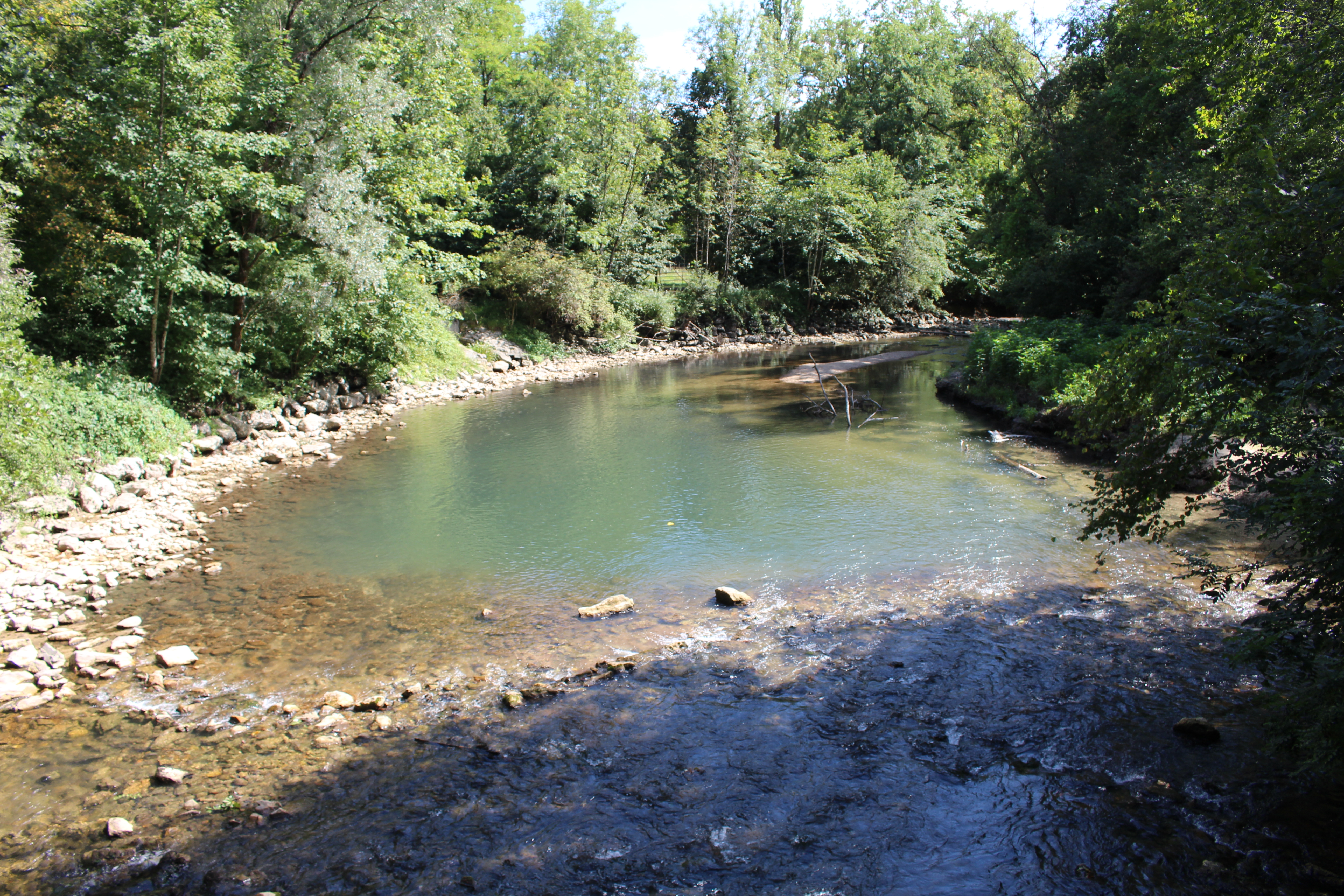 Le Séran près de l'entrée du sentier sur pilotis au Marais de Lavours.